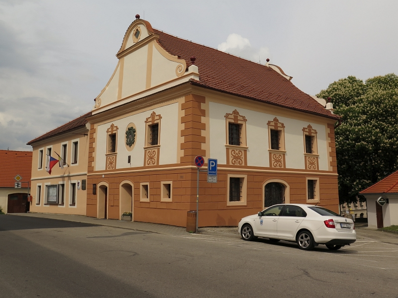 Radnice, Náměstí 76, Velešín, Velešín.